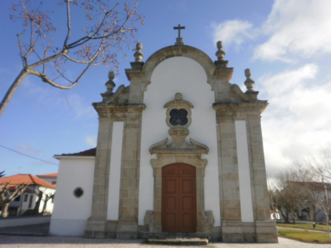 Igreja Matriz de São Pedro